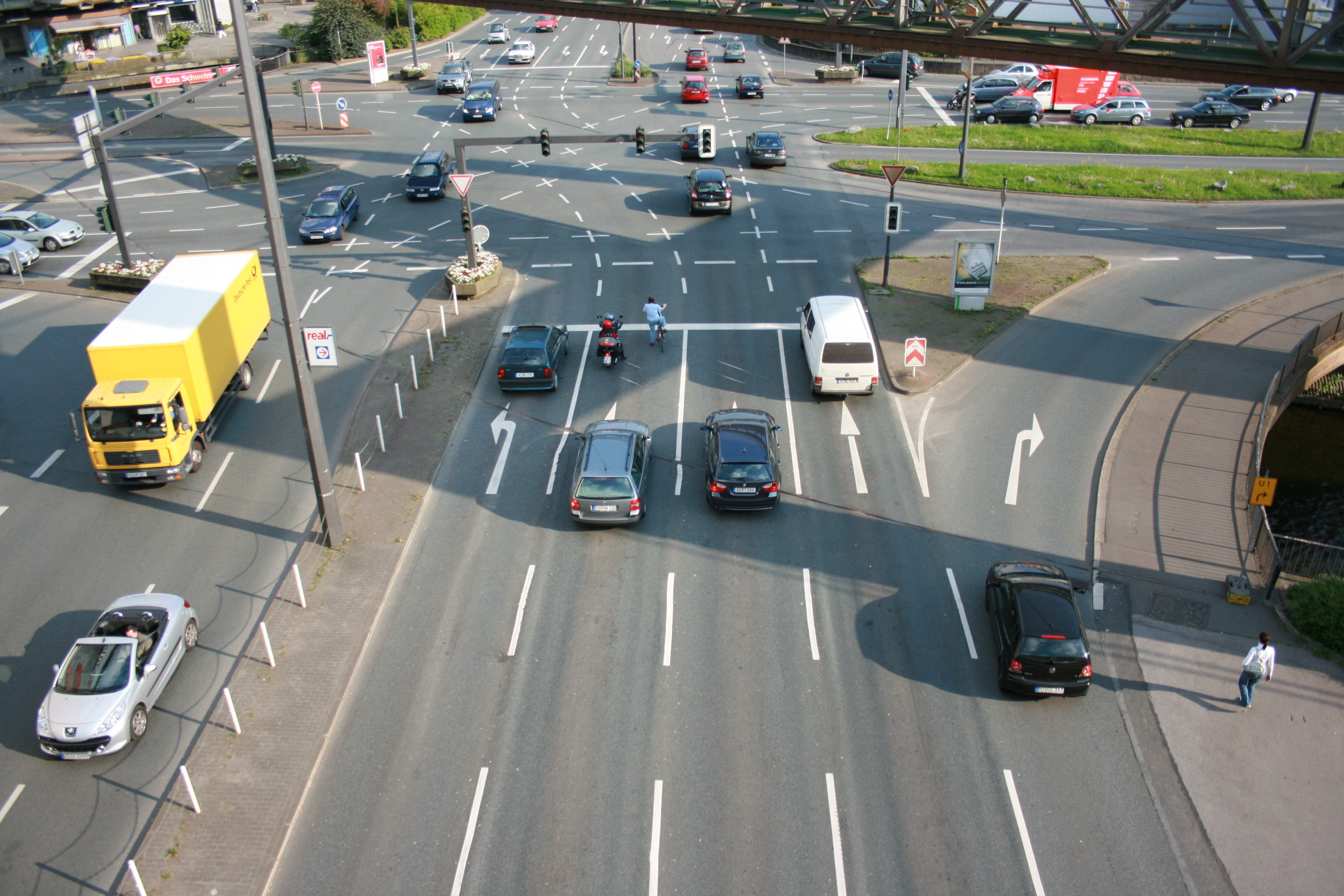 Blick vom Parkhaus Alter Markt in Wuppertal